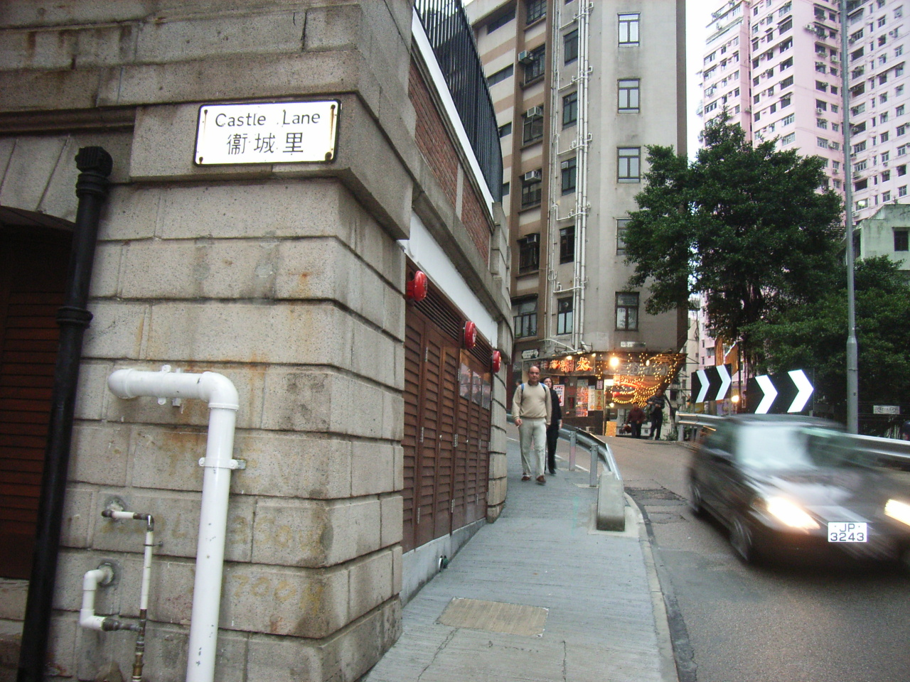 堅道 衛城道, 甘棠第一角